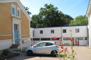 Büchereizentrale Niedersachsen Blick auf Altbau und Neubau